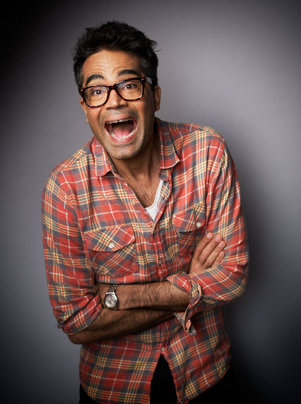 Komikern David Batra.